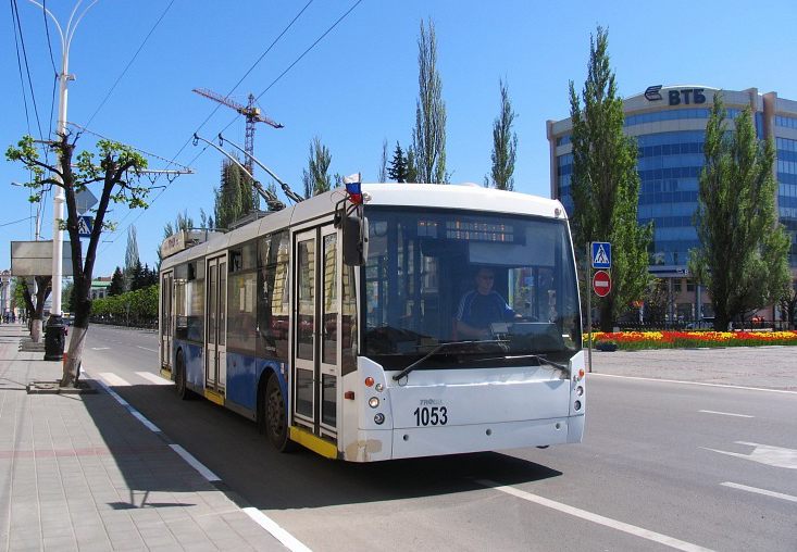 Троллейбус марки ТролЗа-5265 "Мегаполис"